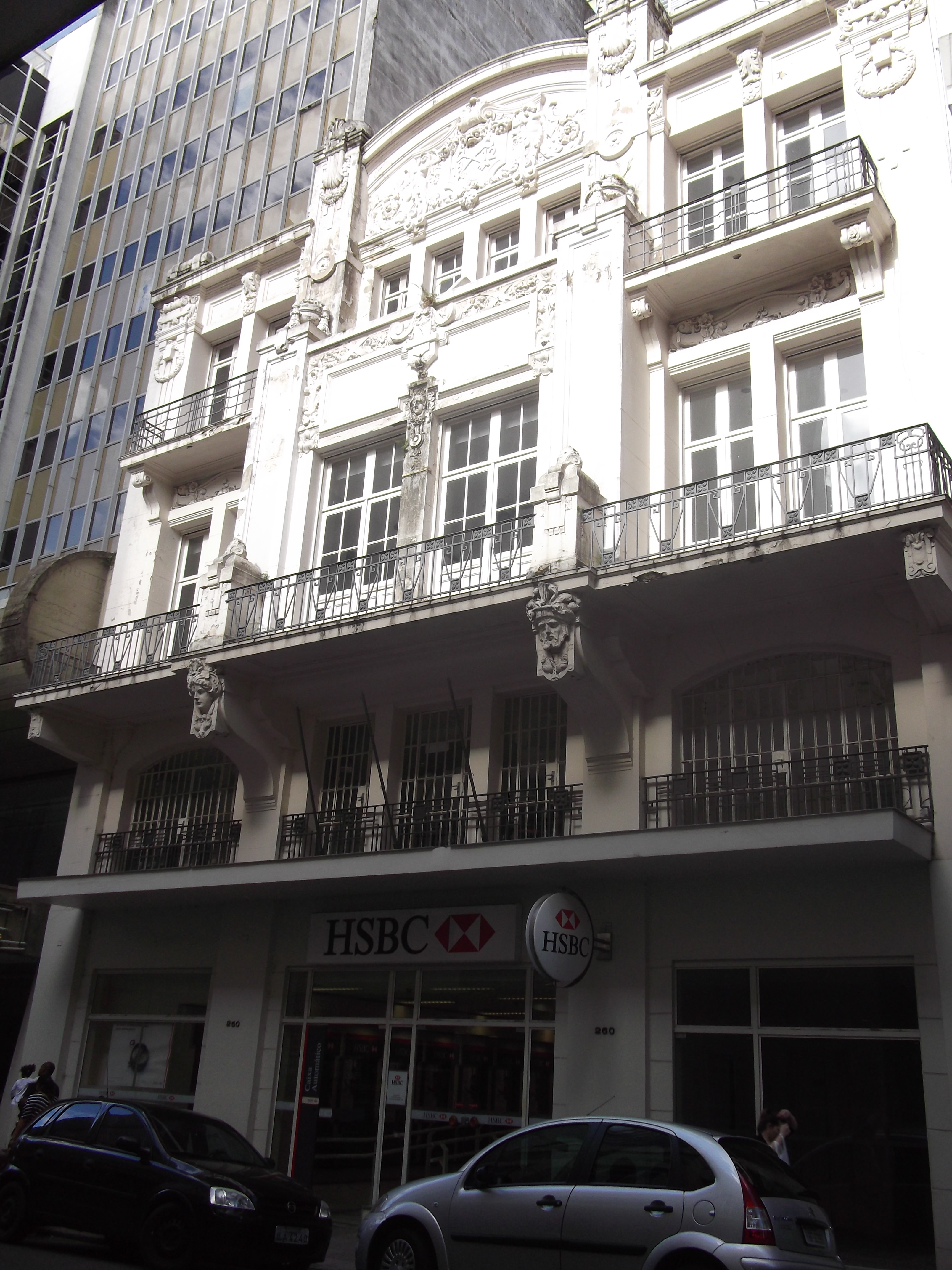 Rua General Câmara n. 269, Porto Alegre, Brasil